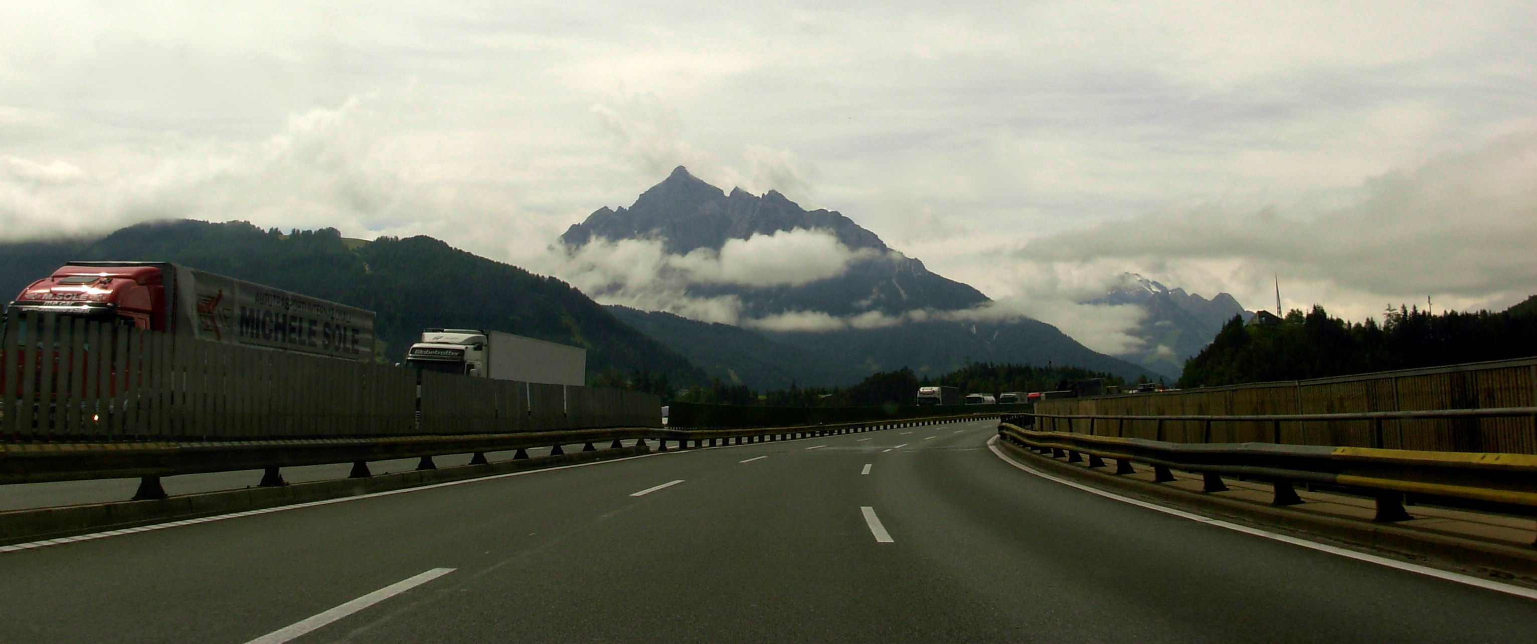 Brenner Autobahn/Brenerio autostrada